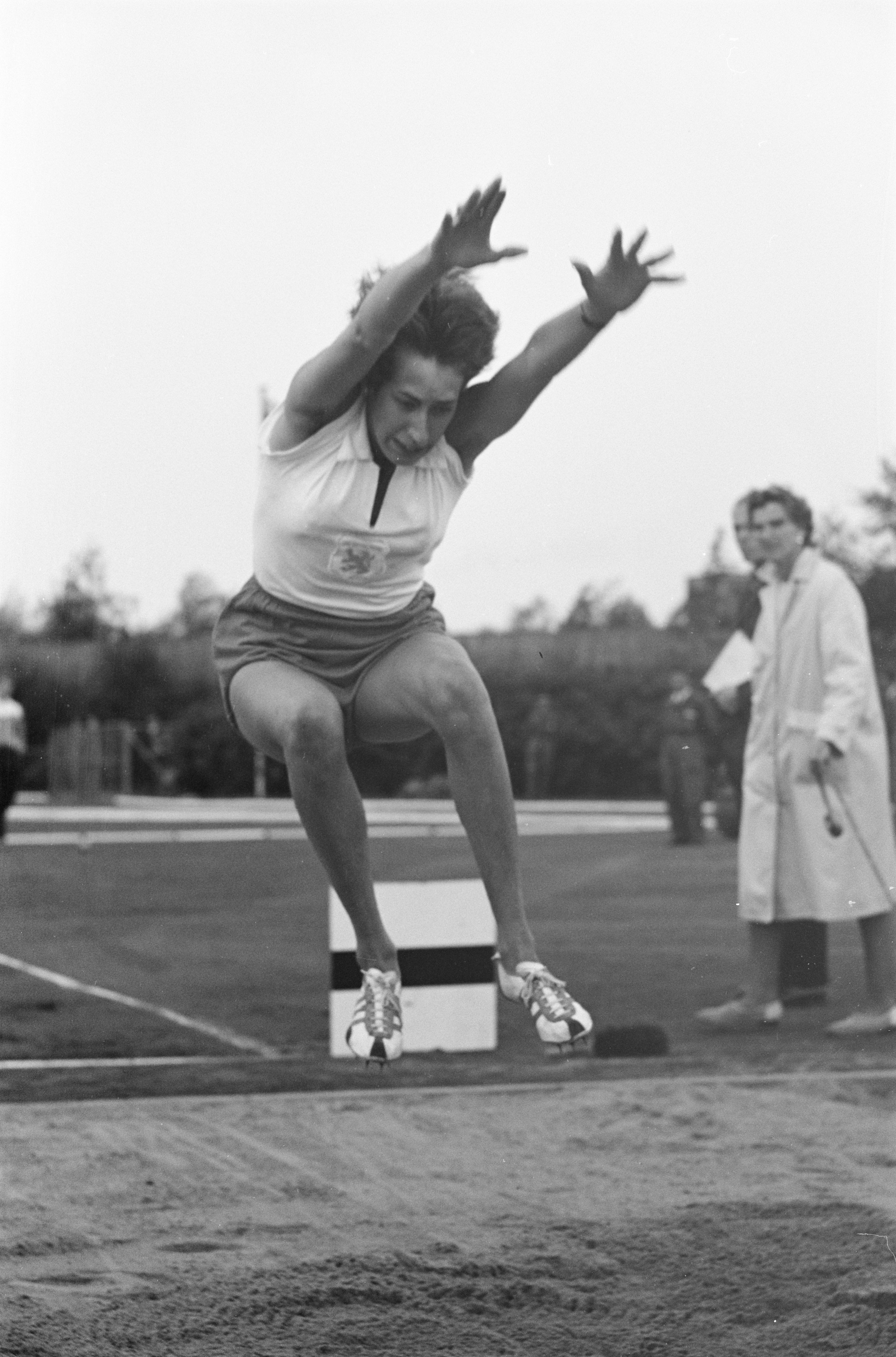 Collectie / Archief : Fotocollectie Anefo Reportage / Serie : [ onbekend ] Beschrijving : Atletiek Nederland tegen Oost-Duitsland. Verspringen Joke Bijleveld Datum : 13 augustus 1961 Locatie : D.D.R., Duitsland, Nederland Trefwoorden : VERSPRINGEN, atletiek Persoonsnaam : Joke Bijleveld Fotograaf : Pot, Harry / Anefo Auteursrechthebbende : Nationaal Archief Materiaalsoort : Negatief (zwart/wit) Nummer archiefinventaris : bekijk toegang 2.24.01.05 Bestanddeelnummer : 912-8351